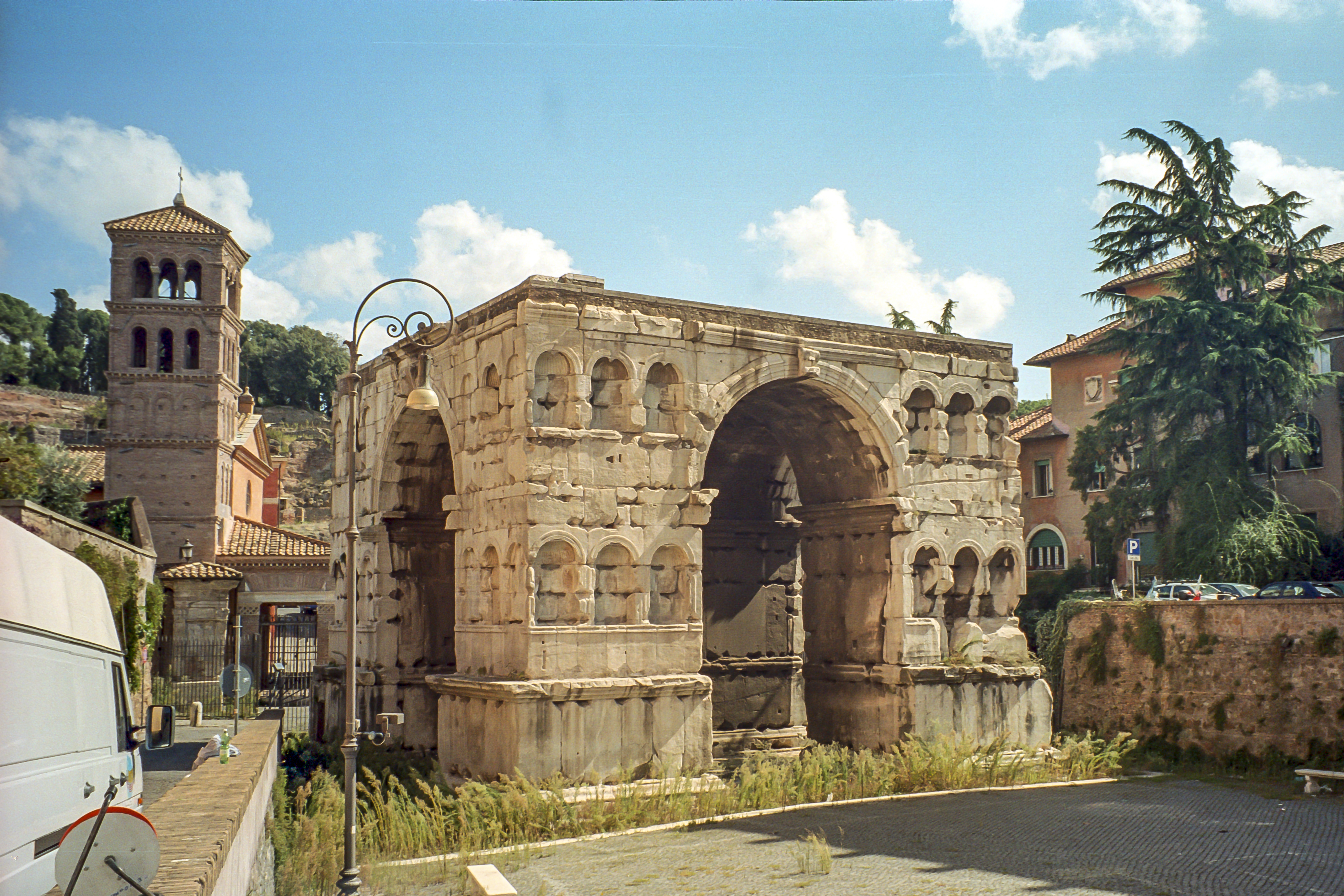 Roma, Arco di Giano